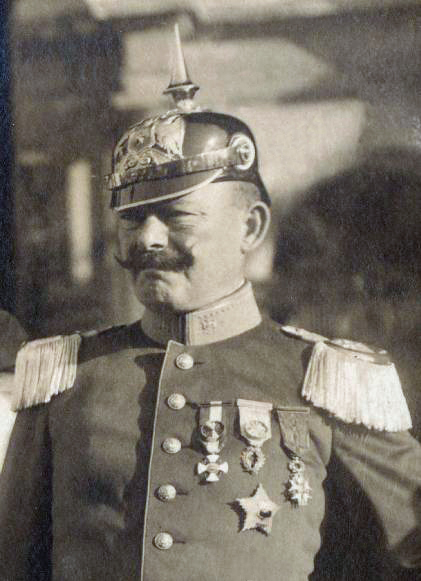 El general de división Pedro Pablo Dartnell Encina (* 31 de diciembre, 1870 - † 26 de septiembre de 1944) fue un militar chileno y miembro de la junta de gobierno de 1925